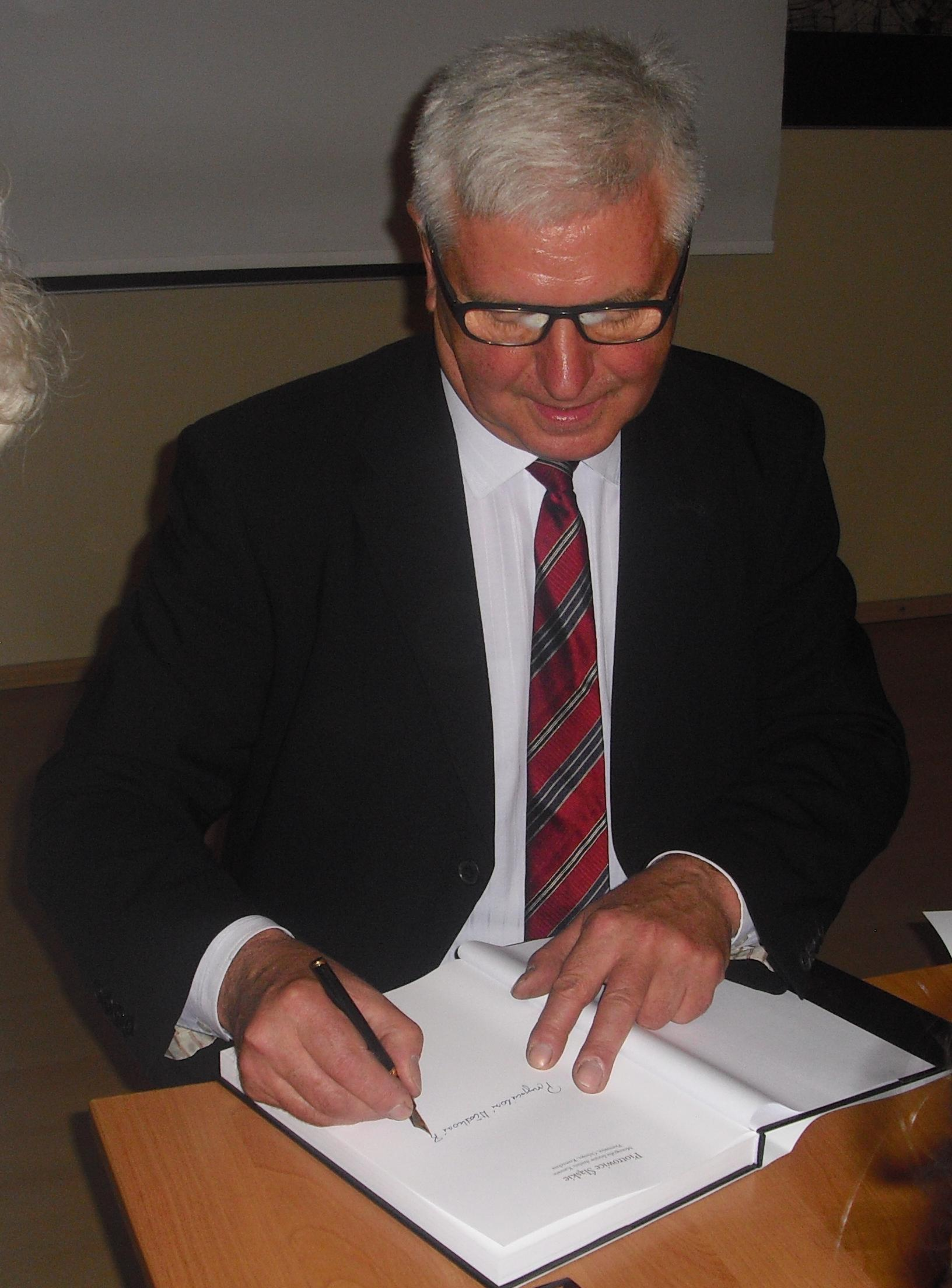 Inż. Stefan Gierlotka